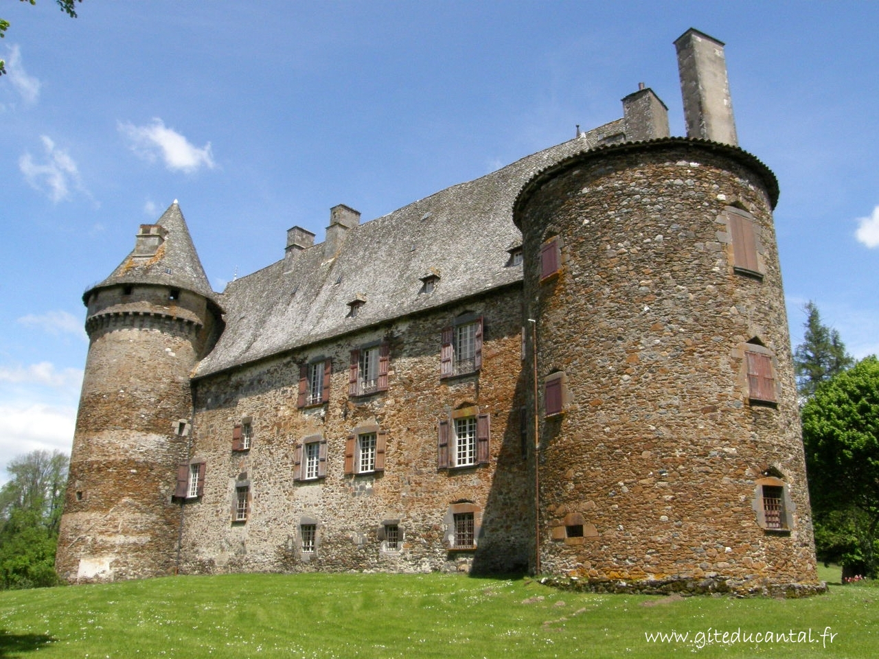 Château de Conros